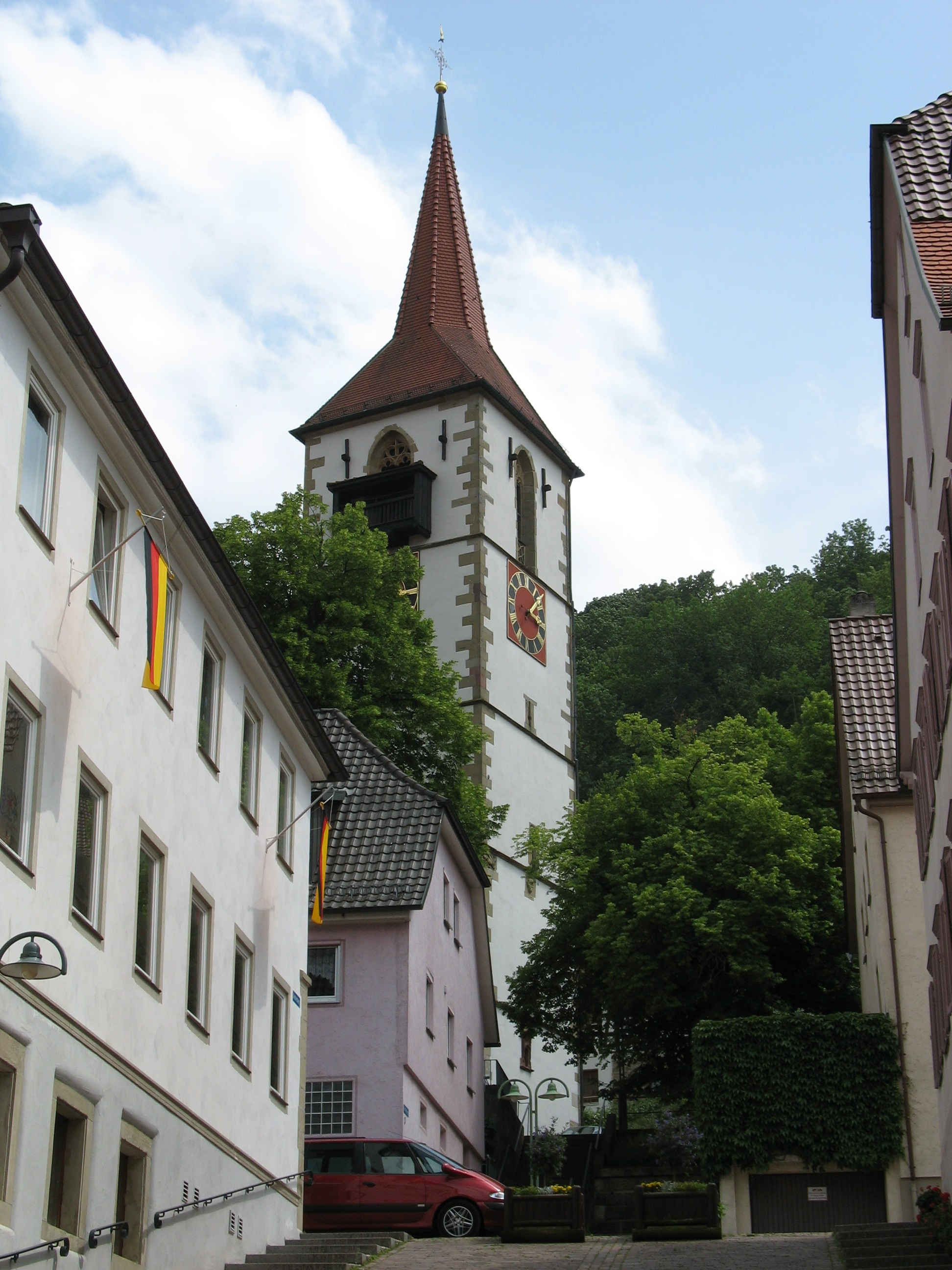 Die evangelische Kirche in Sulz am Neckar